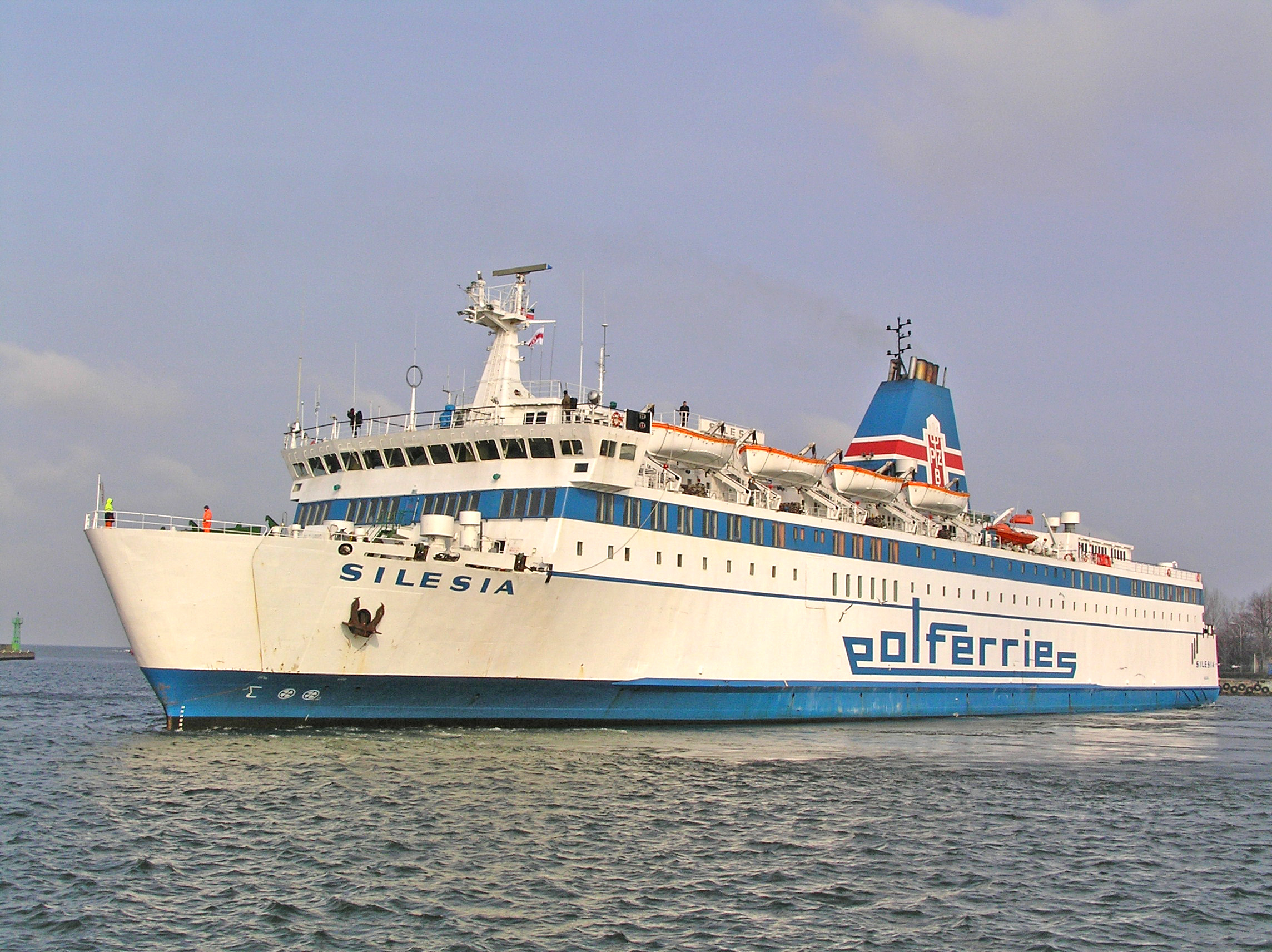 MF Silesia in Gdańsk, Poland.